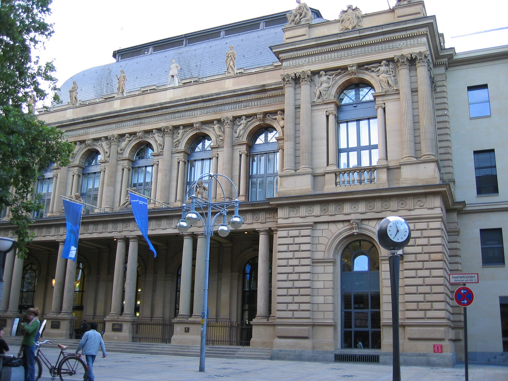 Frankfurt Stock Exchange